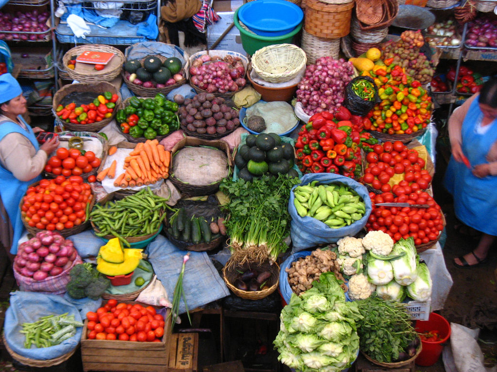 Mercado de la ciudad de Sucre capital de Bolivia